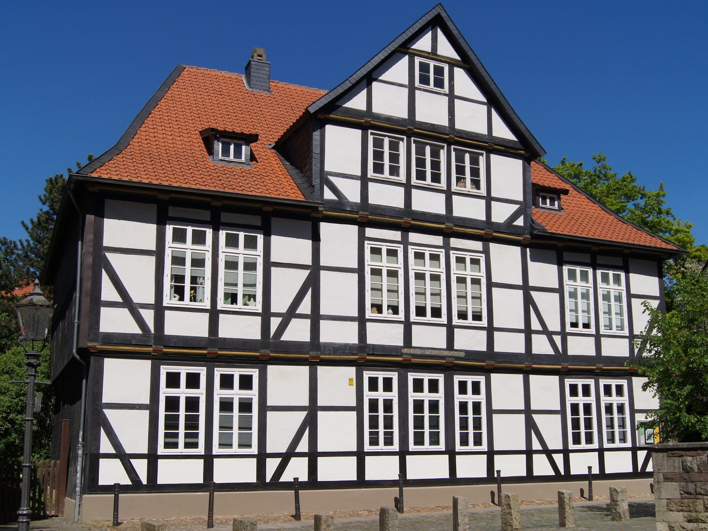 Denkmalgeschütztes Pfarrhaus von St. Magni in Braunschweig